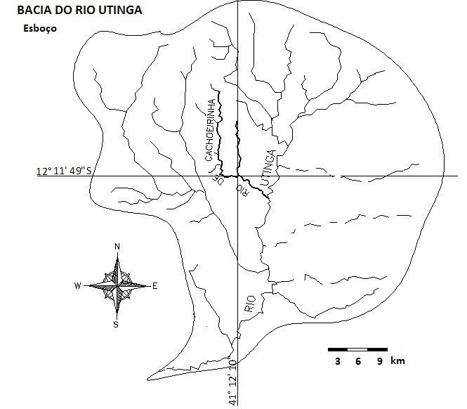 Este esboço mostra a bacia hidrogáfica do Rio Utinga e sua localização geográfica no globo através das coordenadas com destaque para o Rio de Cachoeirinha na Bahia, Brasil. Unknown